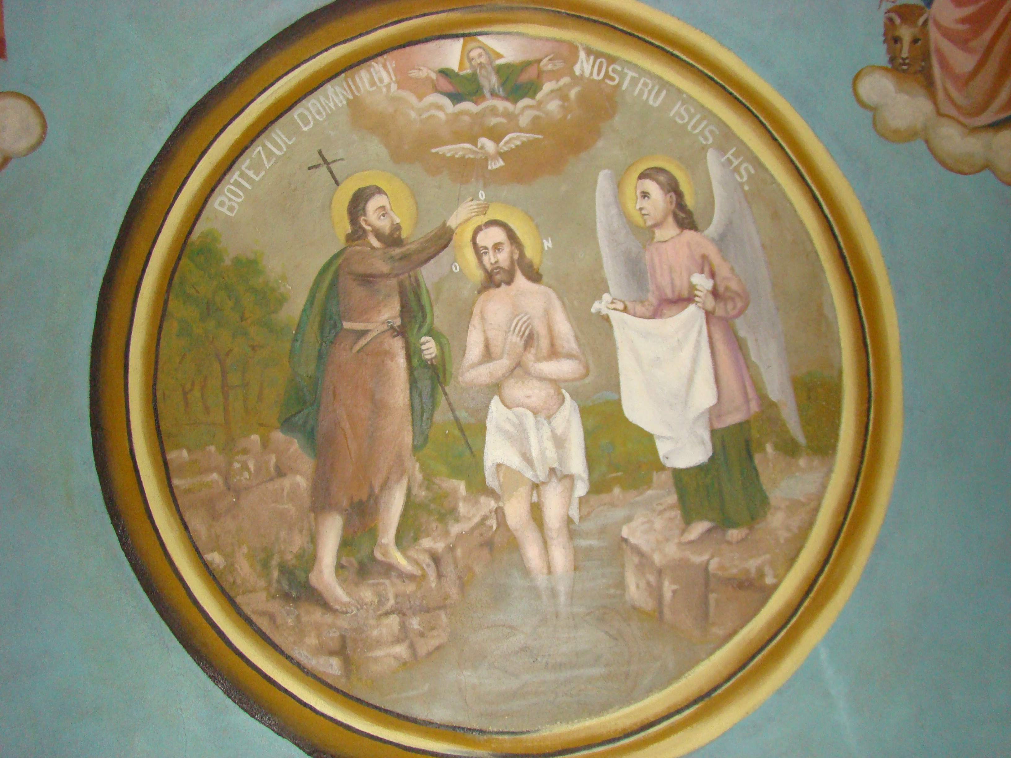 Biserica ortodoxă din Poienari, județul Gorj